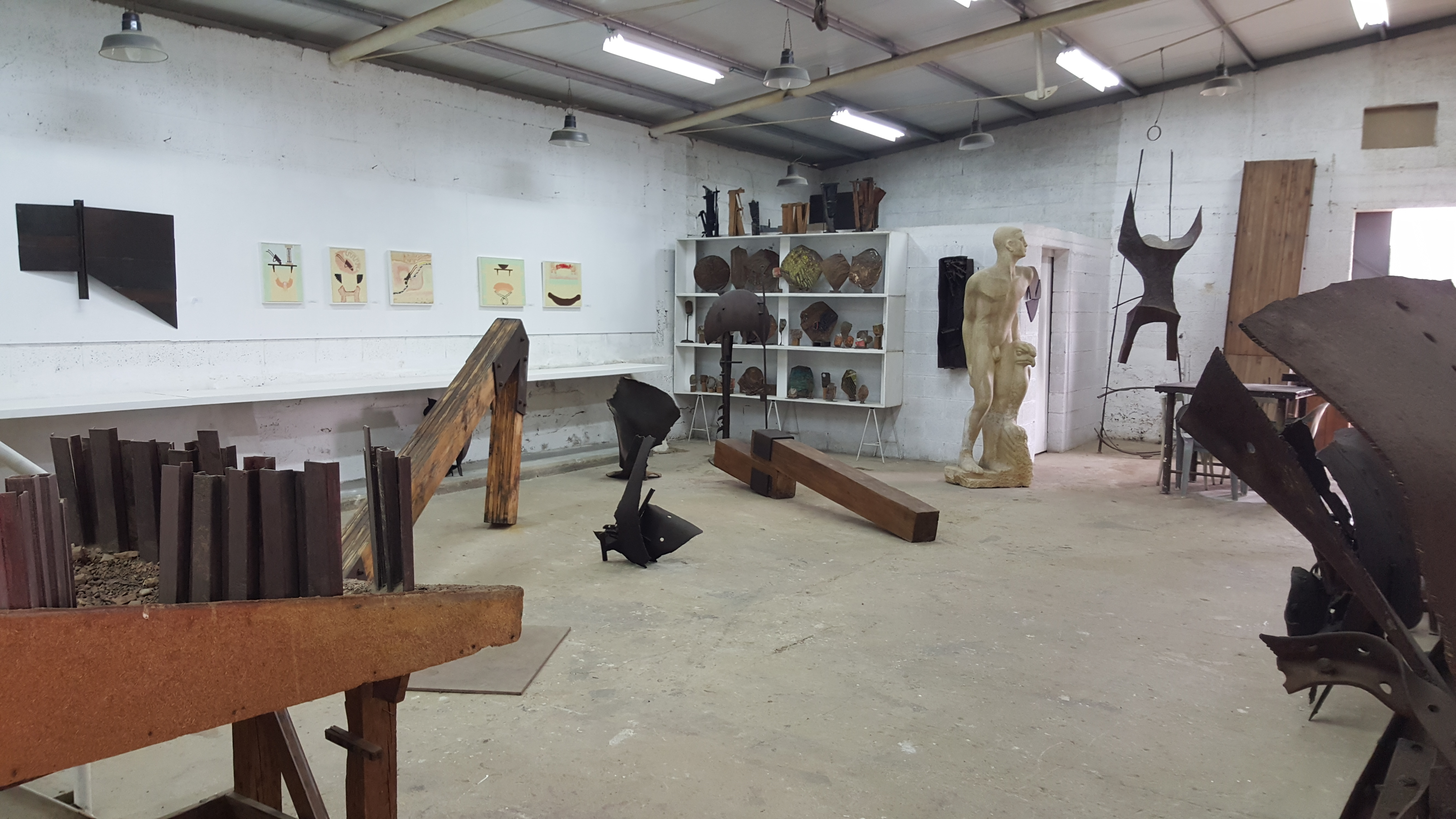 חלל התצוגה אטלייה שמי - קיבוץ כברי